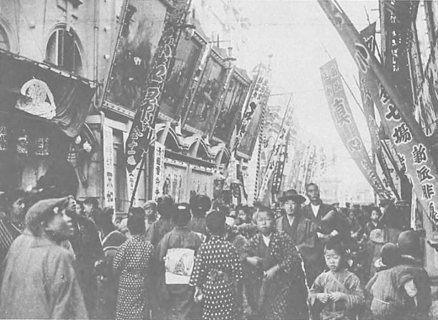 明治末期の浅草六区